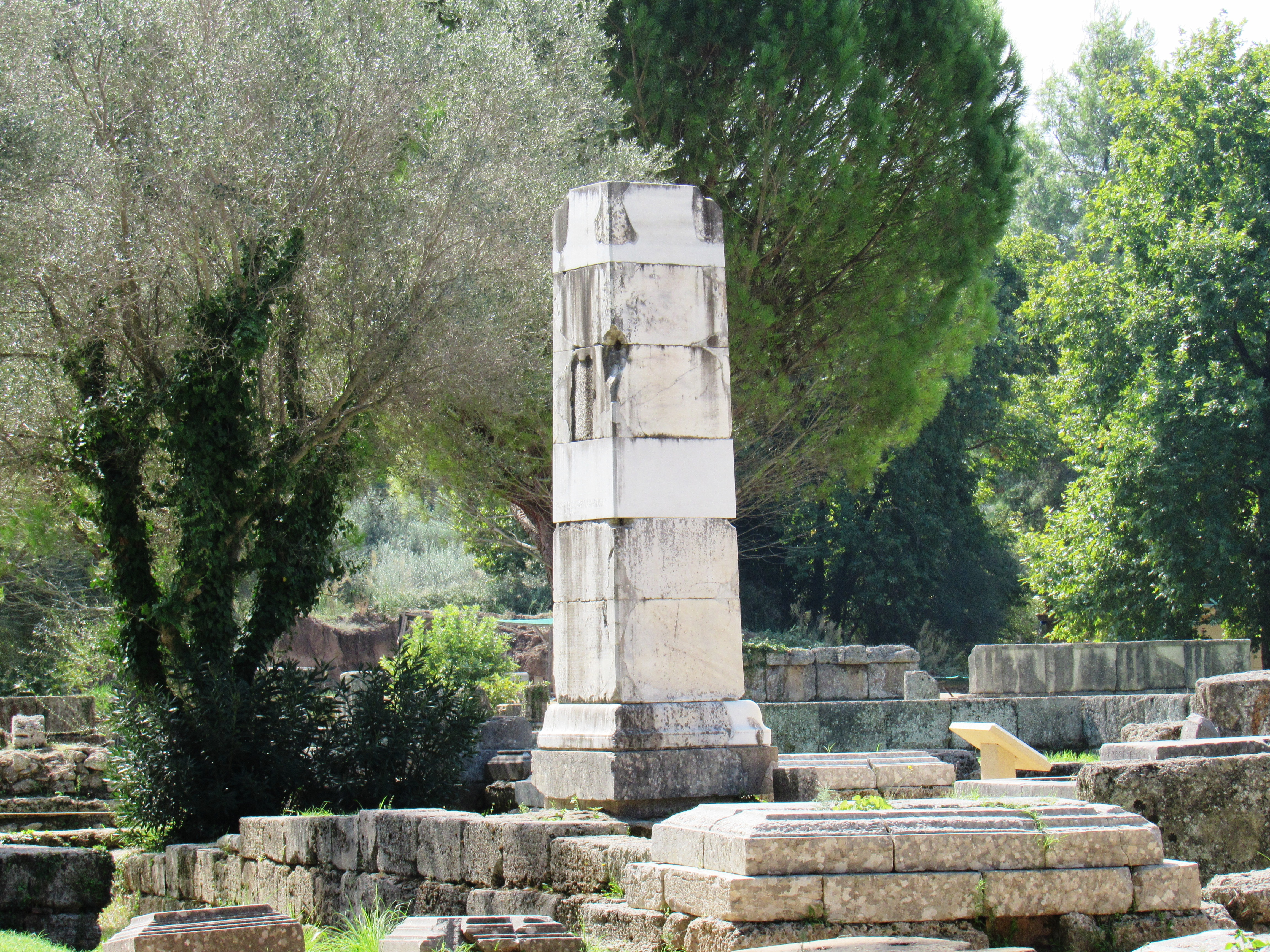 Βάθρο της Νίκης του Παιωνίου στην ανατολική πλευρά του Ναού του Δία στην Αρχαία Ολυμπία«Βάθρο της Νίκης του Παιωνίου»